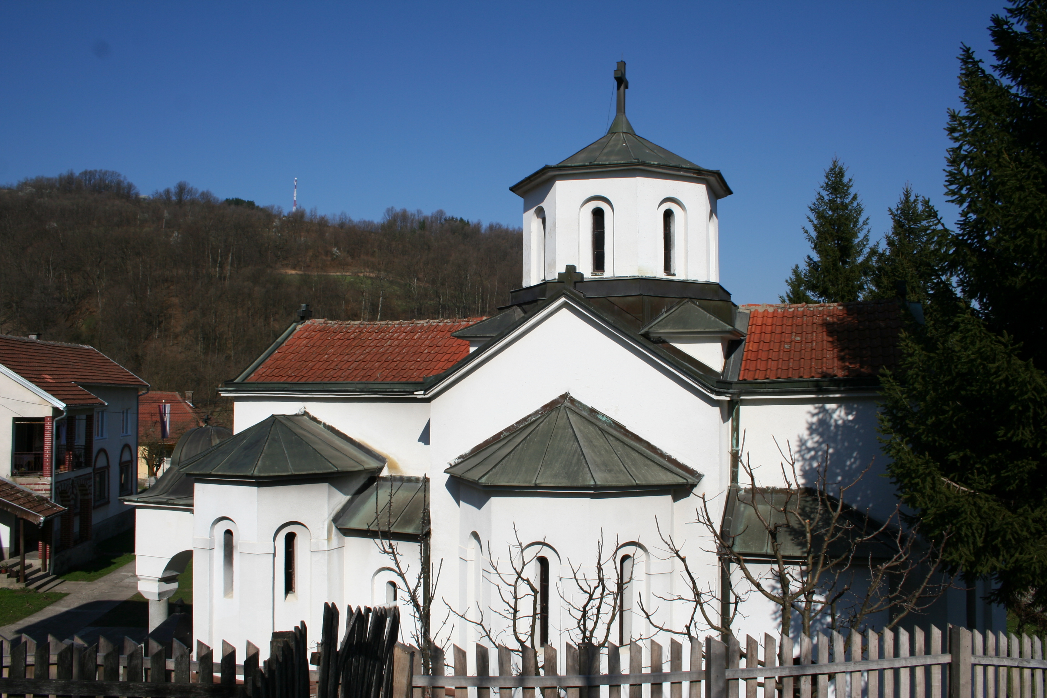 Spomen crkva i kosturnica Pecka